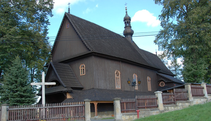 Sobolów - rzymskokatolicki kościół parafialny p.w. Wszystkich Świętych i MB Częstochowskiej, 1594